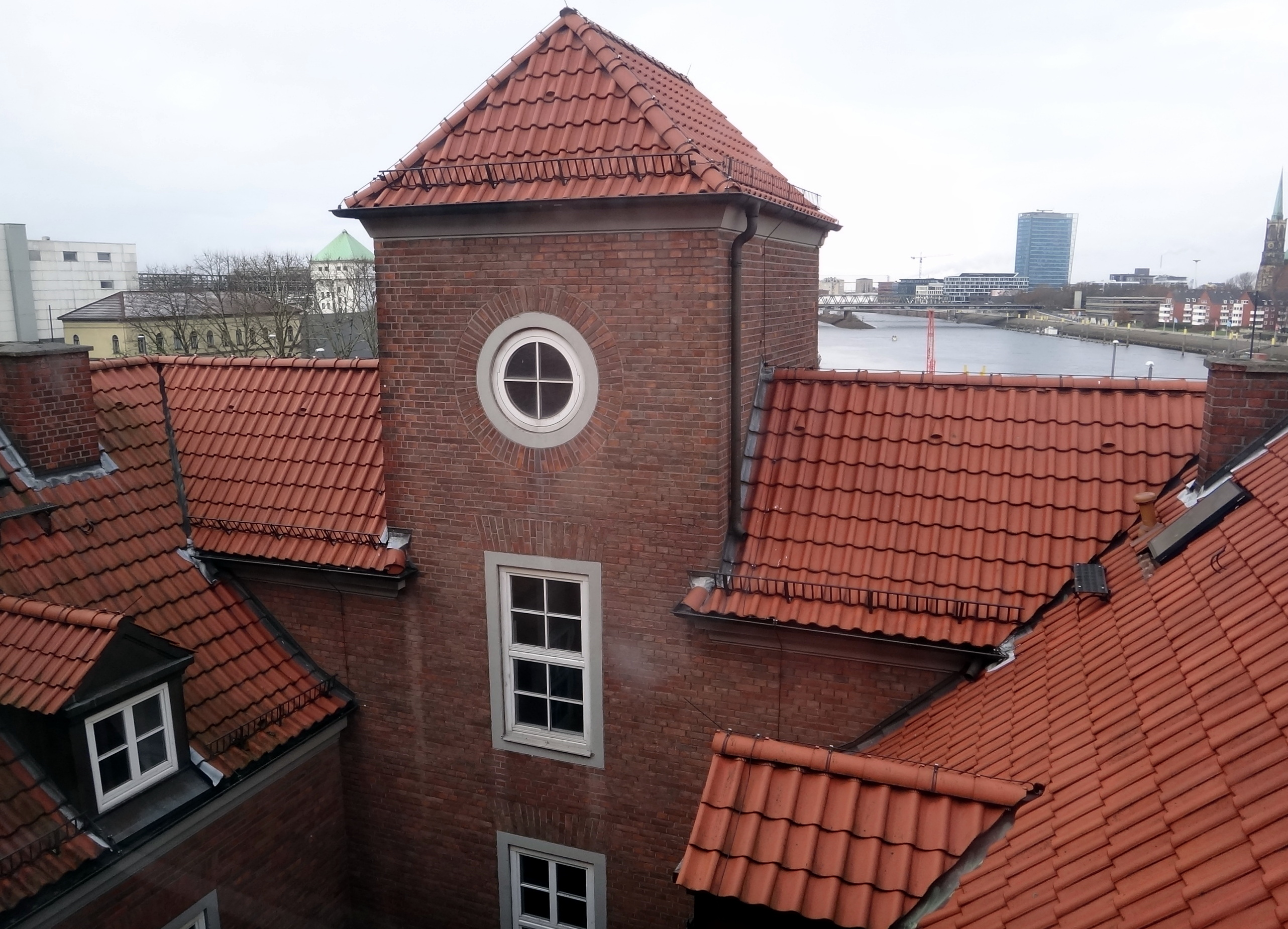 Blick vom Inneren der Weserburg auf die Weser.